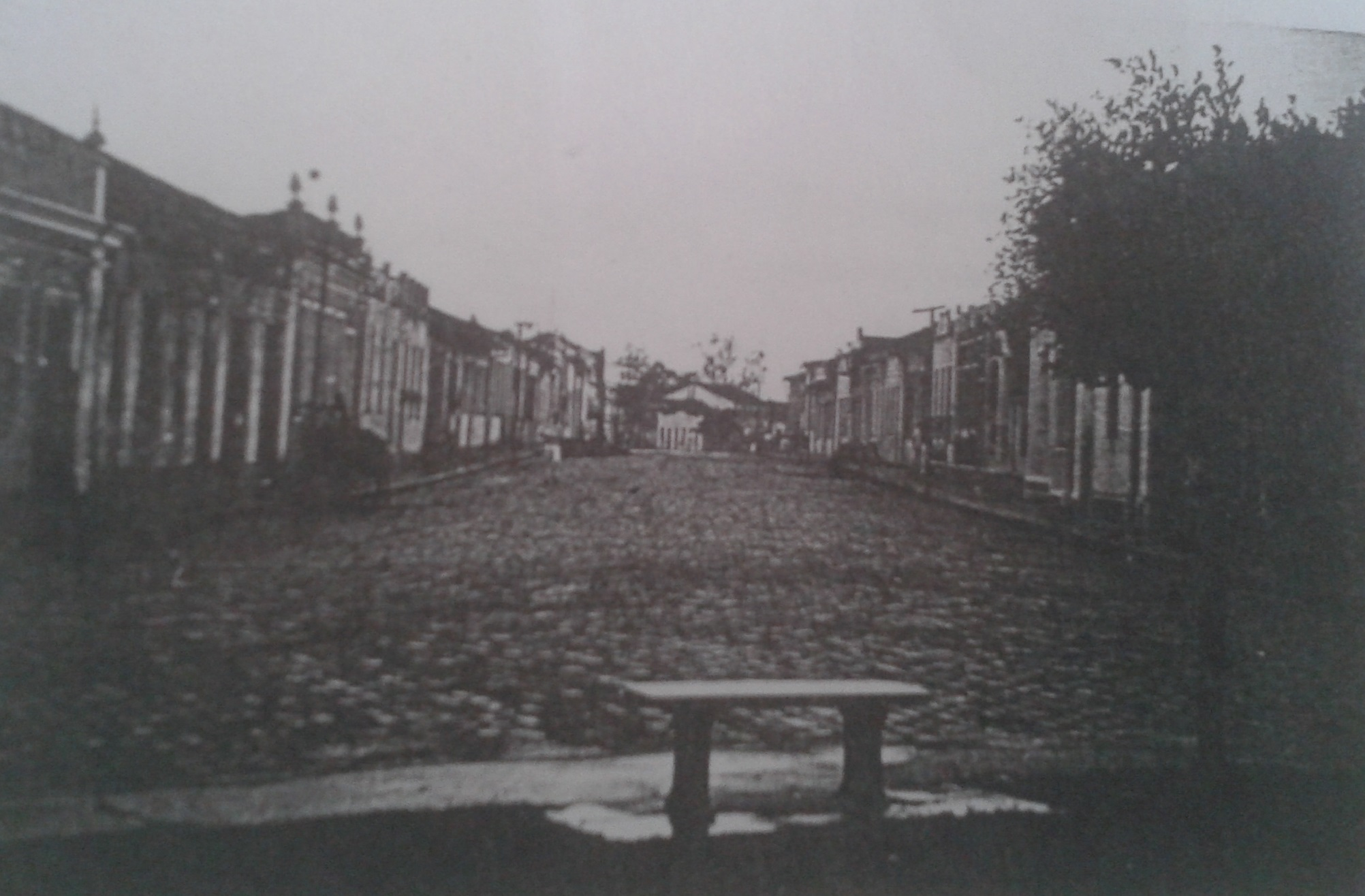 Rua JJ Seabra Fonte: Livro Pojuca: O Arraial da Passagem